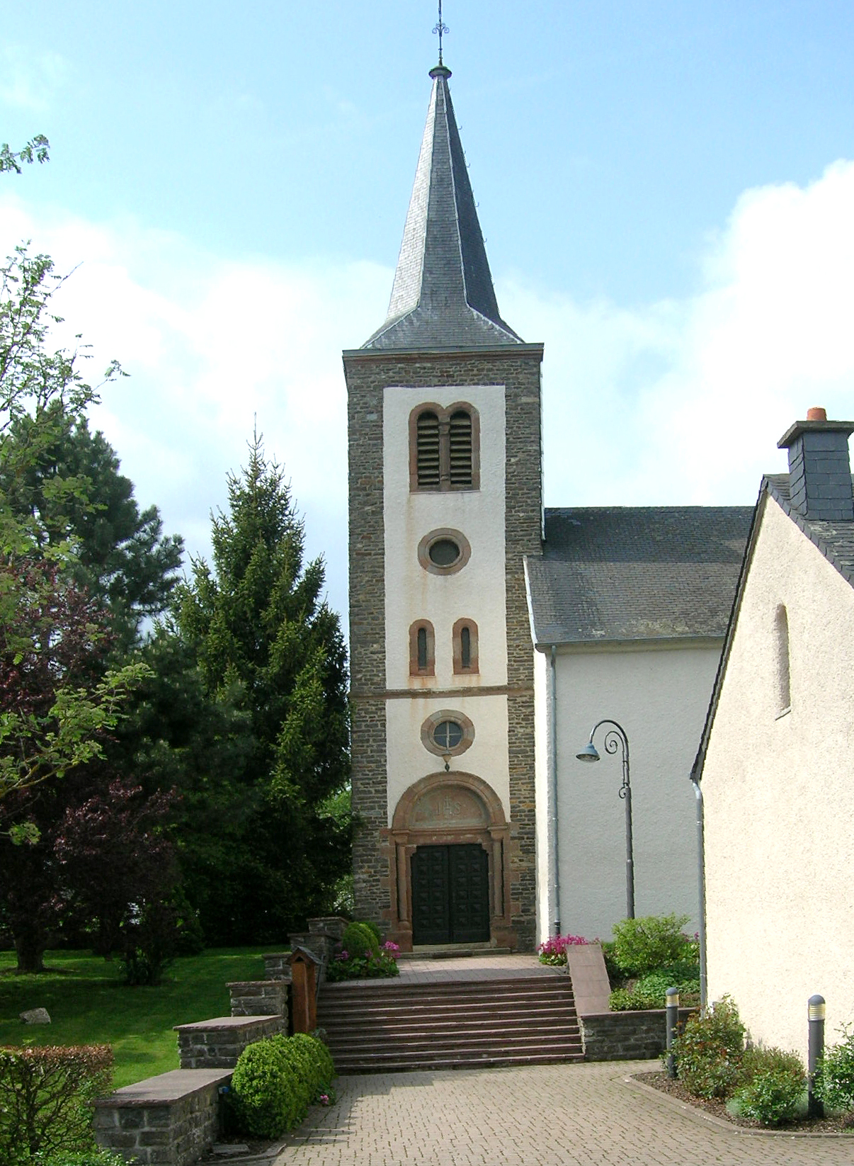 L'église de Doncols